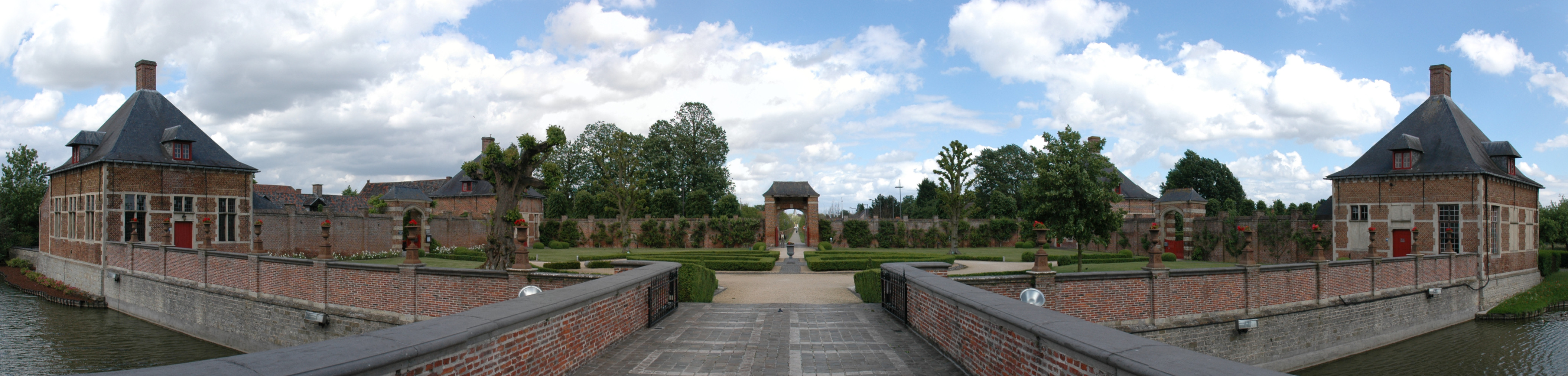 Schloss Laarne in Ostflandern, Panorama des Vorhofs This image was created with Hugin